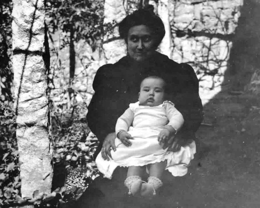 Xosé Fernando Filgueira Valverde fotografado, aínda de bebé, no colo dunha muller sentada, nunha horta.